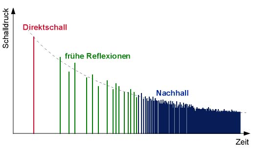 Beispiel für die Zeitfunktion einer Raumimpulsantwort